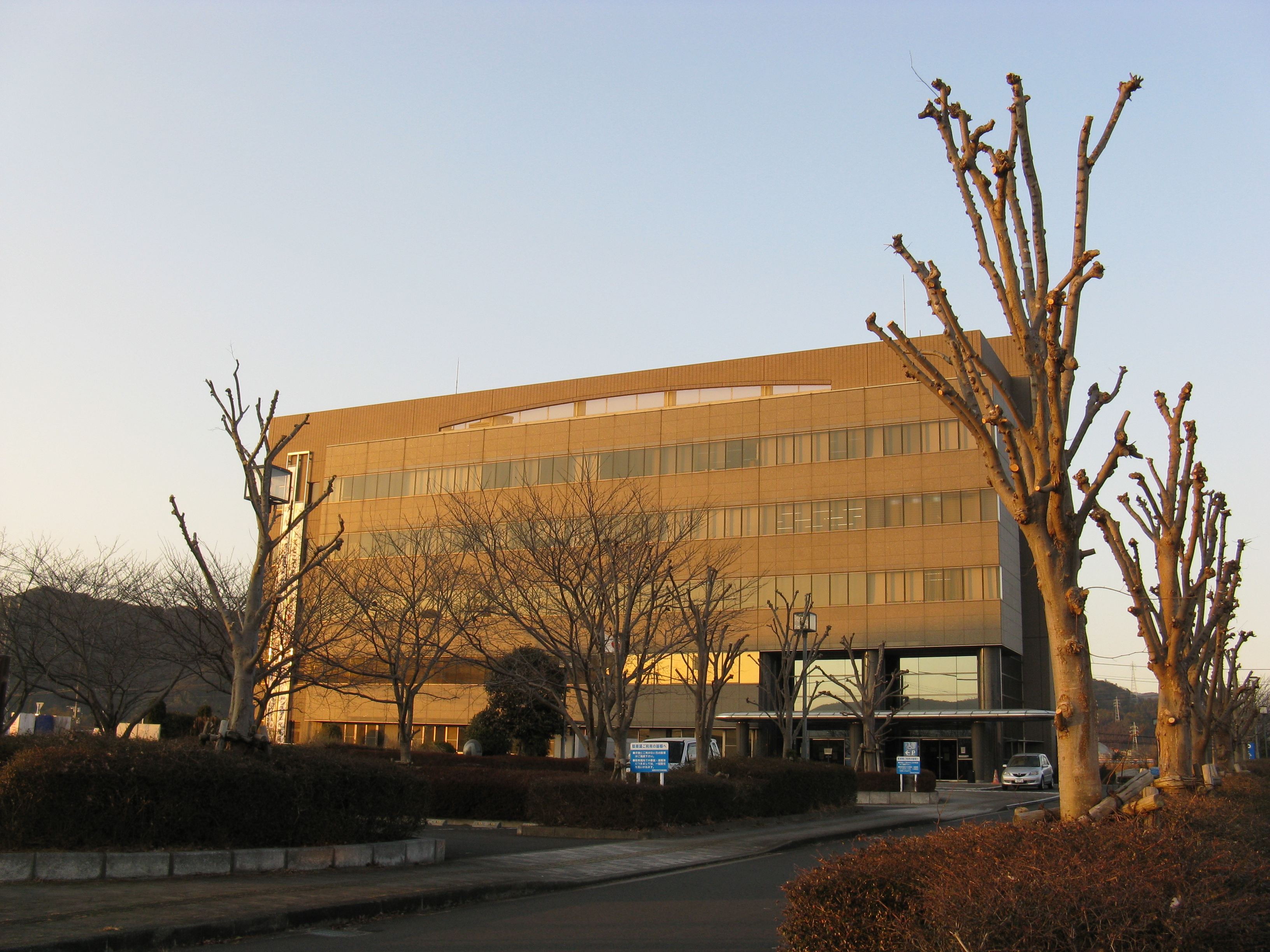 延岡合同庁舎 宮崎地方検察庁延岡支部、延岡区検察庁、日向区検察庁、高千穂区検察庁、宮崎地方法務局延岡支局、熊本国税局延岡税務署、九州農政局延岡地域センター